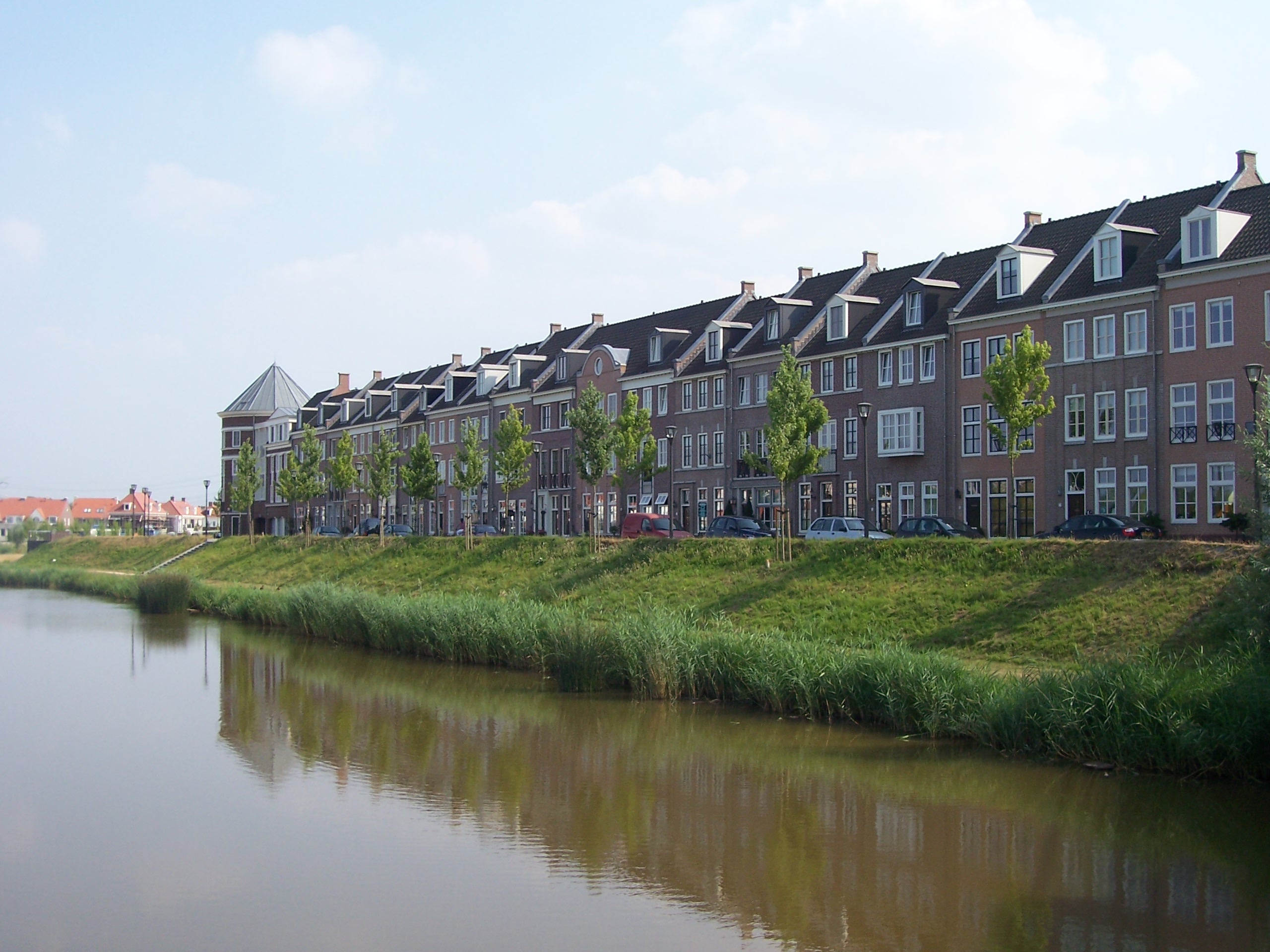 Helmond Brandevoort: De Veste aan de buitenkant.